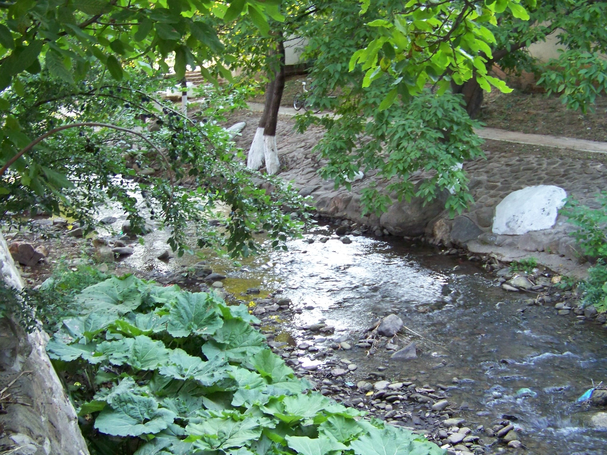 Зрновската река низ Зрновци